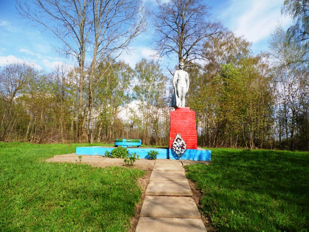 Помнік загінуўшым ў Вялікай Айчыннай вайне